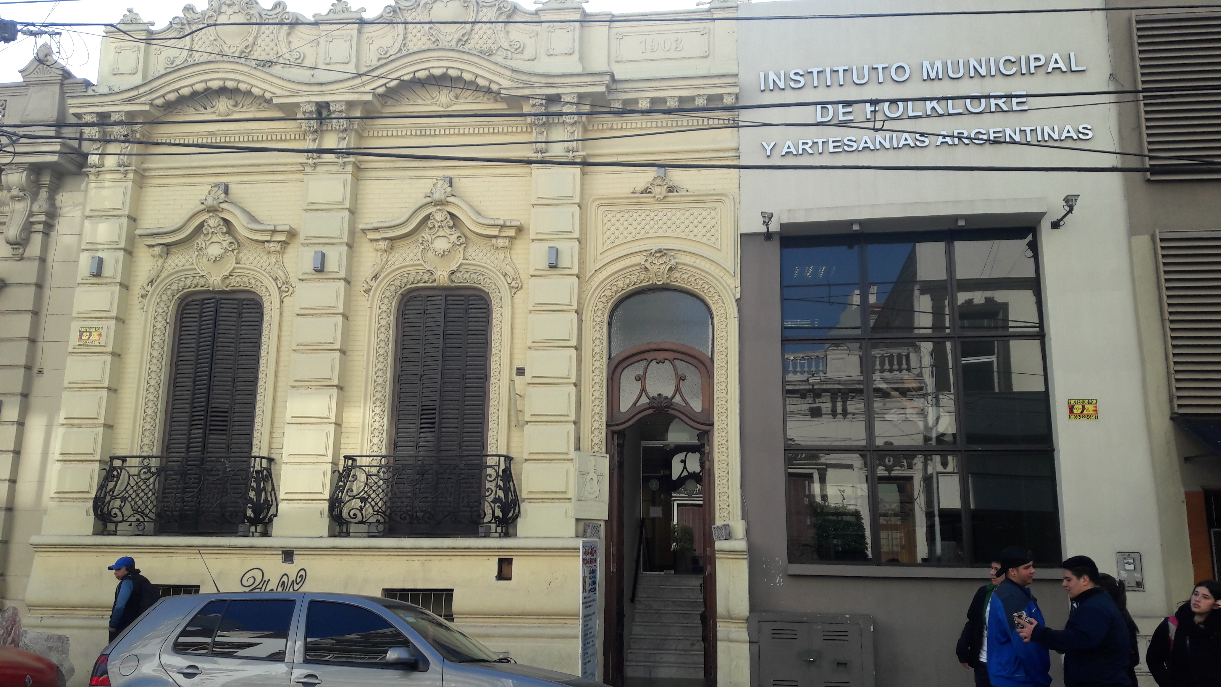 en la foto se ve el antiguo nuevo de instituto municipal de folklore y artesanía.